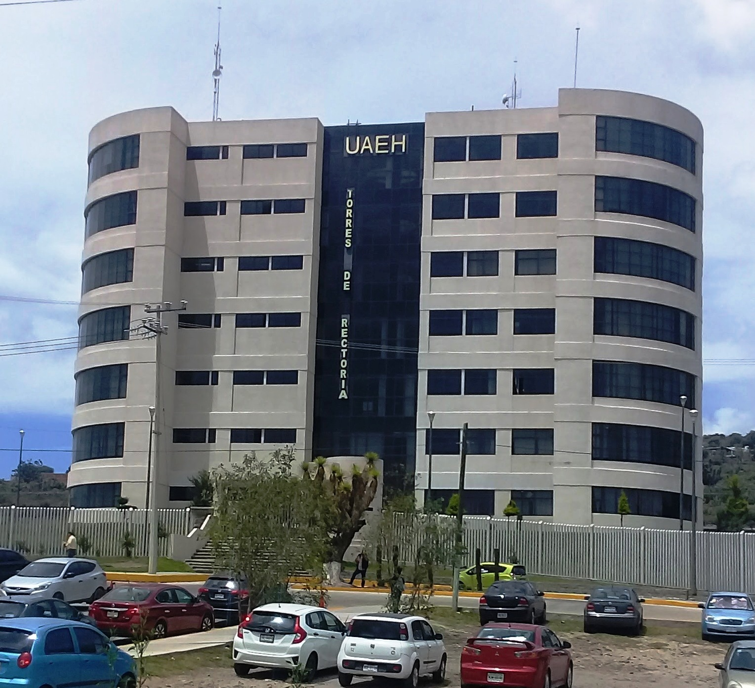 Edificio de Rectoria de la UAEH